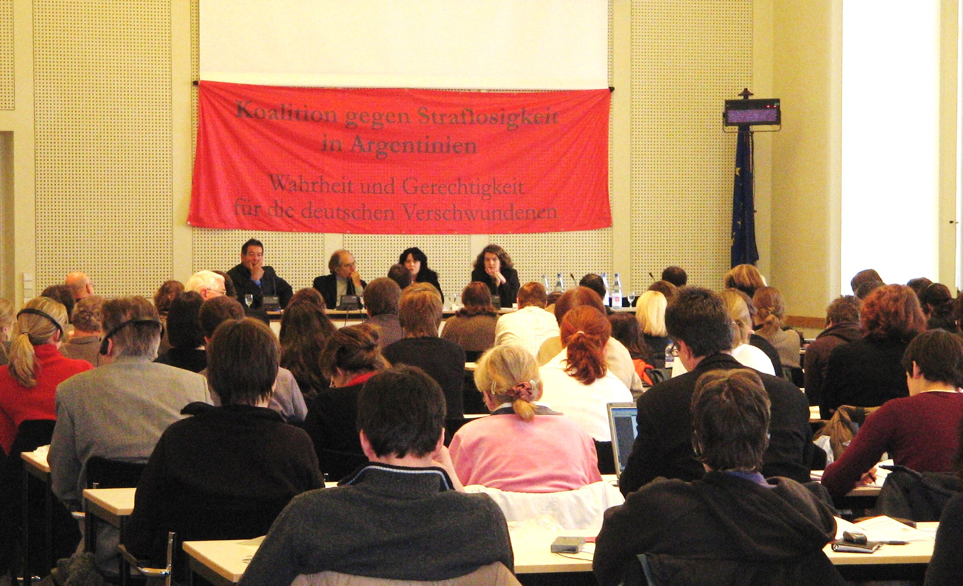 Audiencia pública de la Coalición contra la Impunidad en Berlin